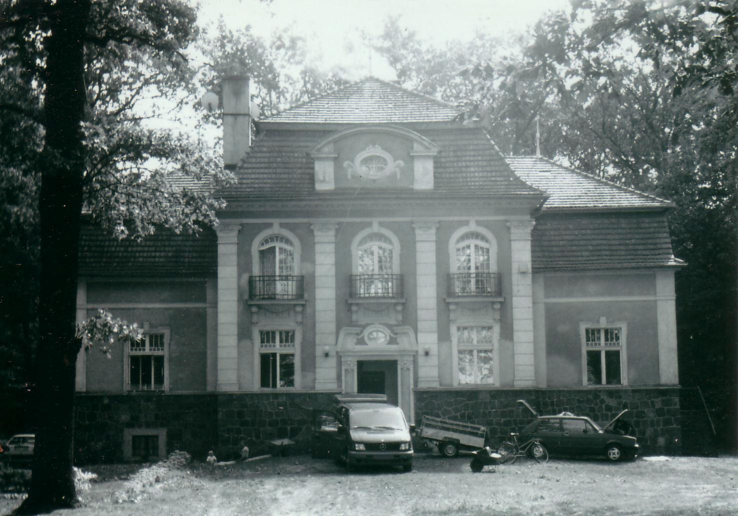 dębiogóra pałac, debiogora palace